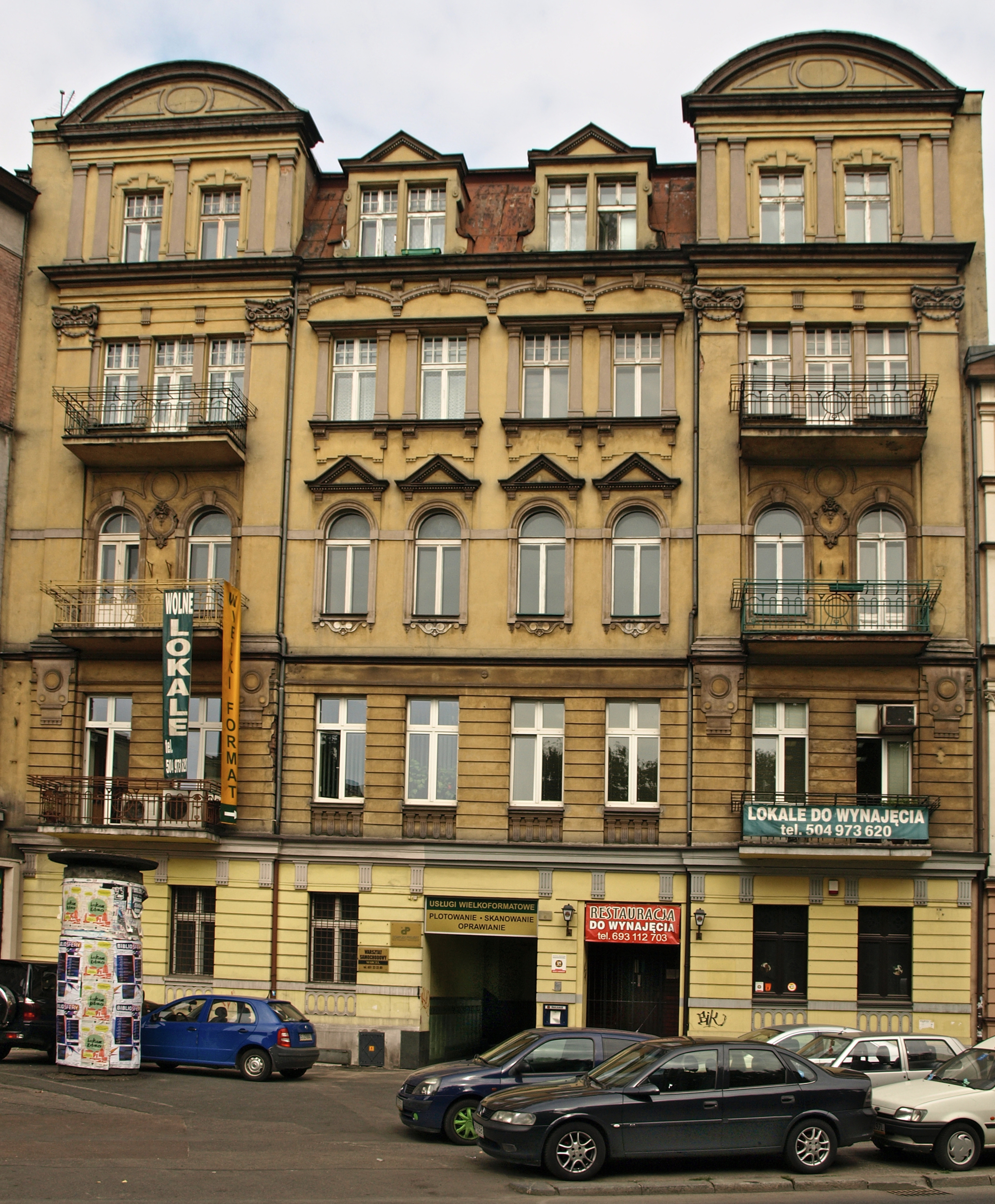 zabytkowa kamienica położona przy pl. Wolności 6; wzniesiona w 1896, w stylu neoklasycystycznym